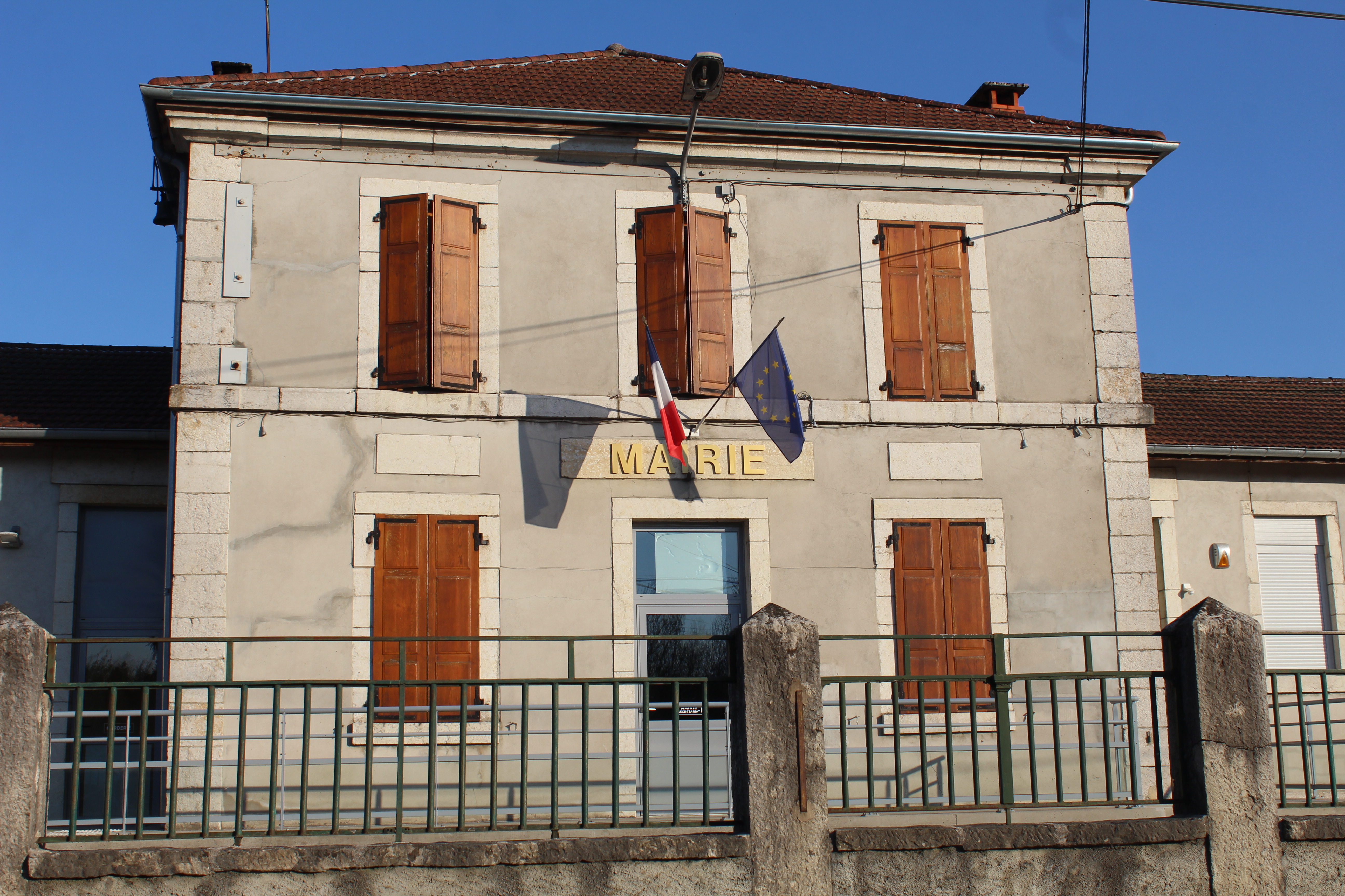 Mairie de Condamine, Ain.